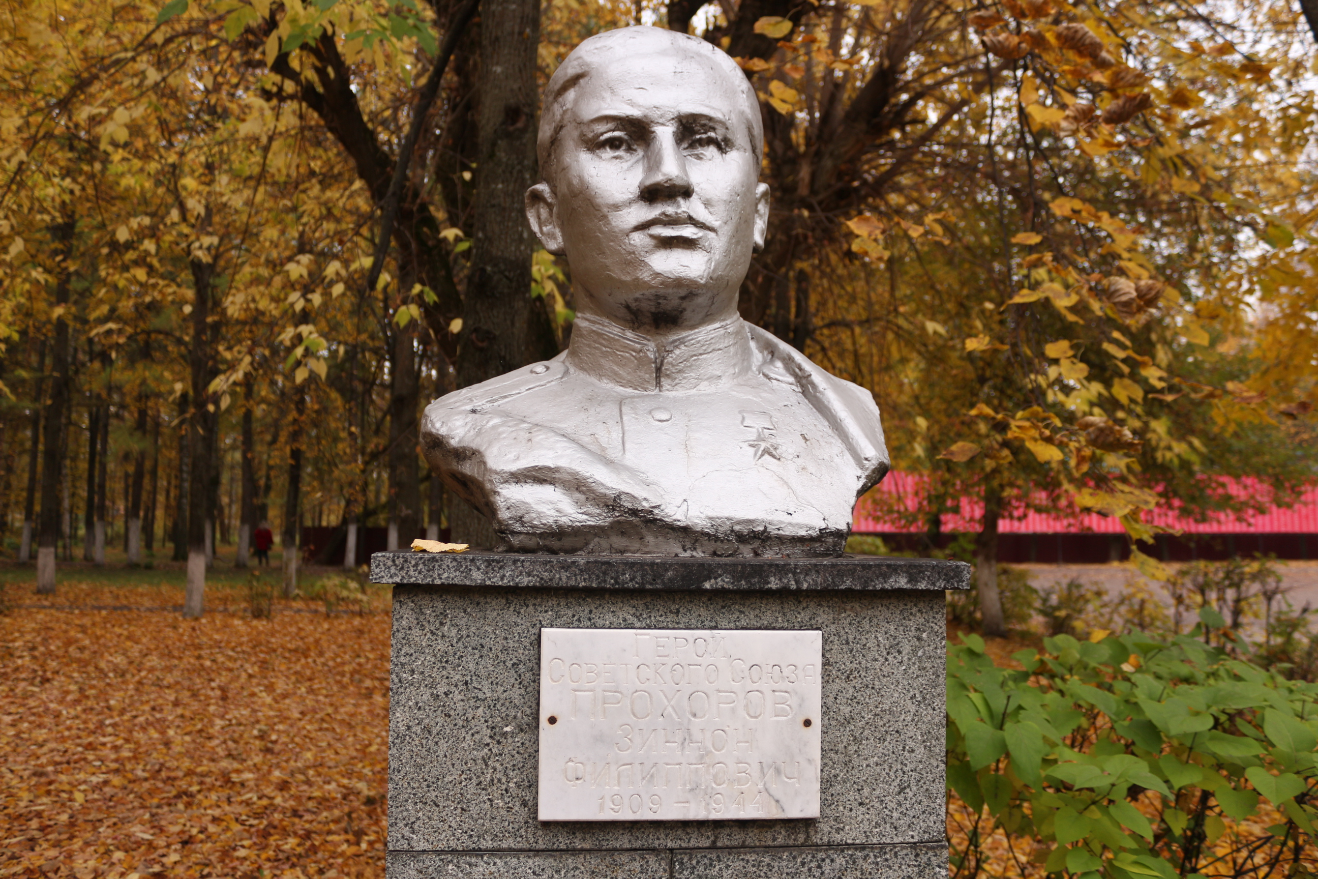 Бюст героя Советского Союза З.Ф. Прохорова: старый парк, Волжск, Марий Эл